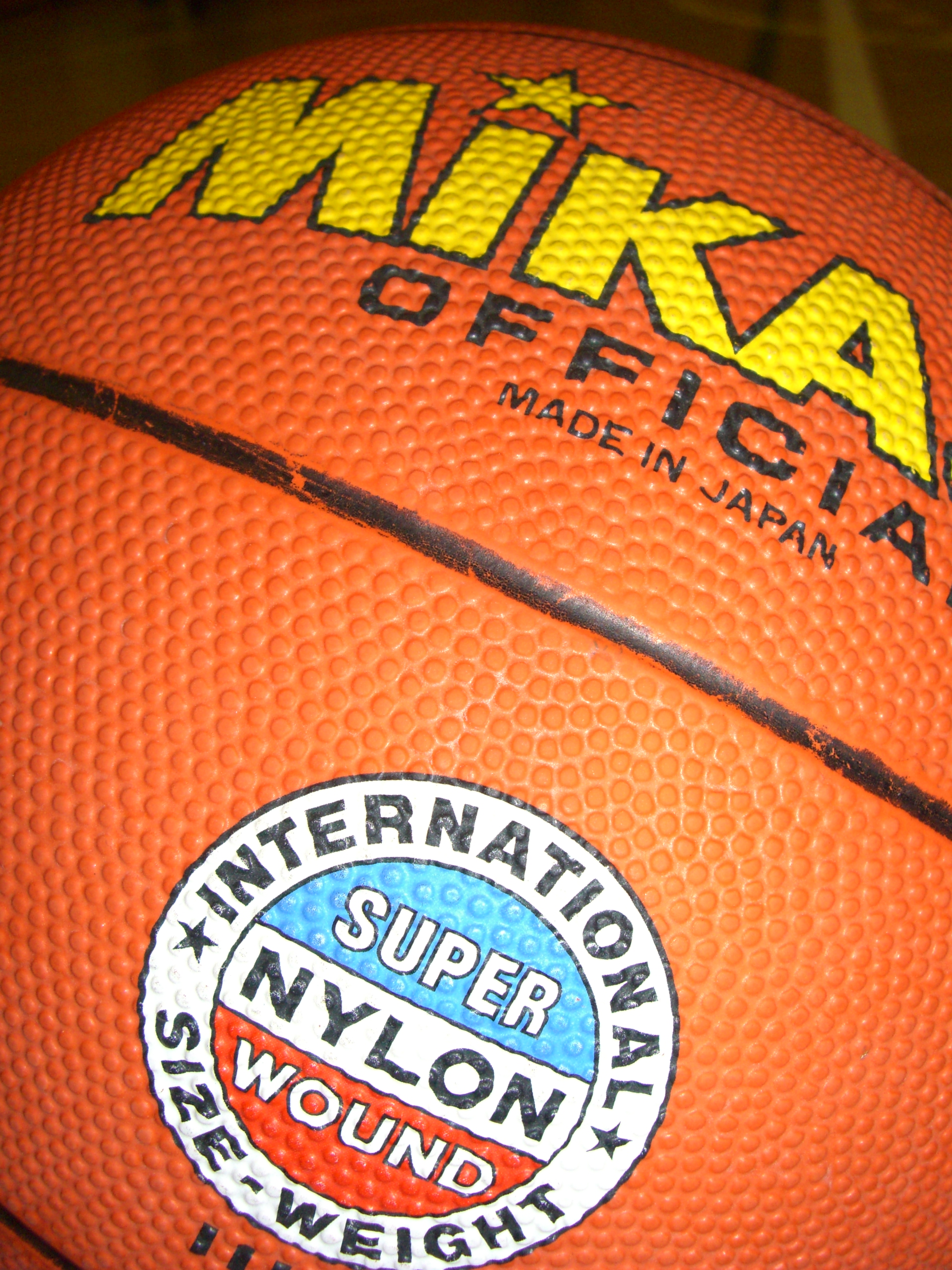 Mikasa Official Basketball